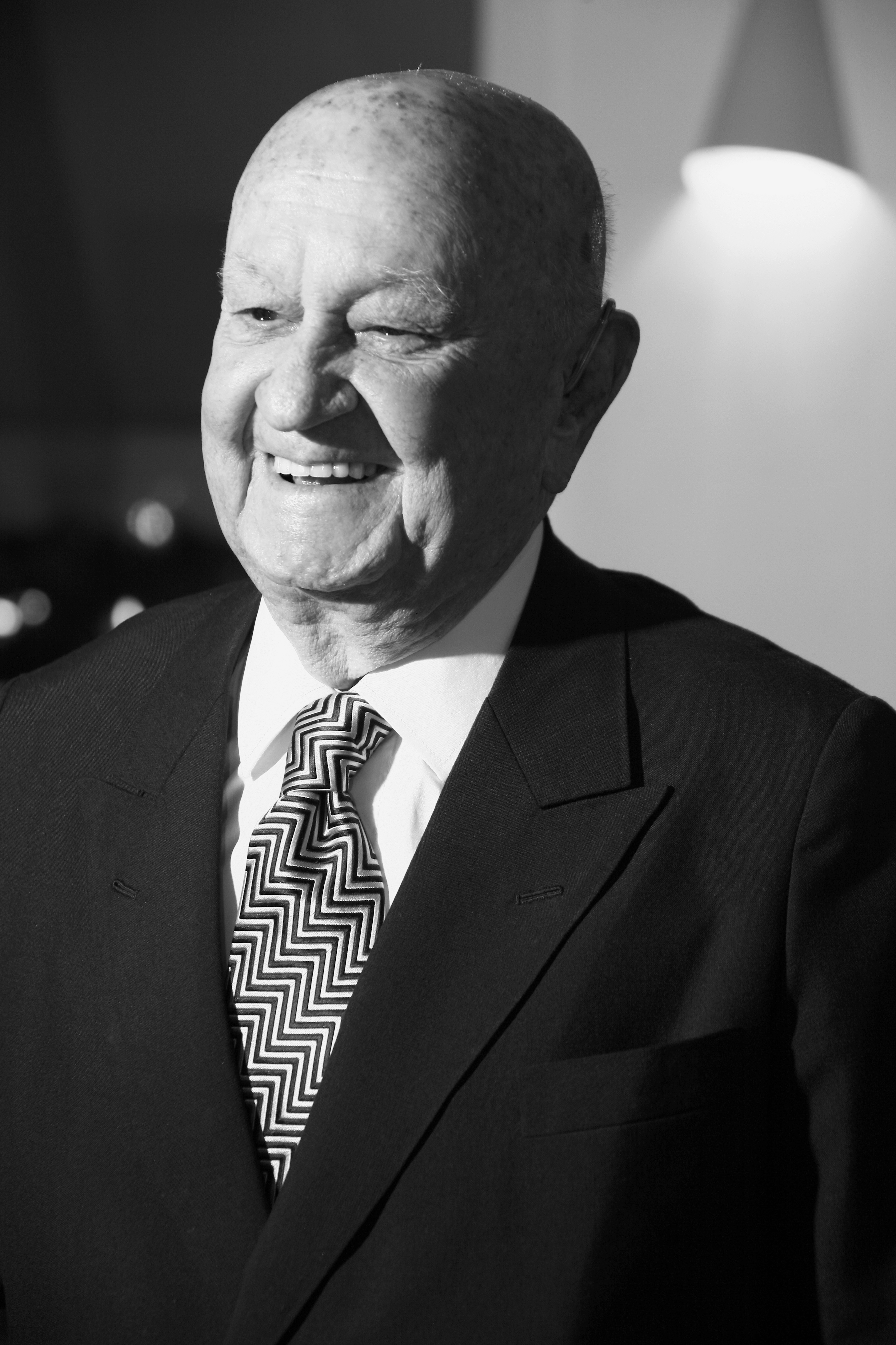 Foto tirada pelo fotógrafo Fábio Martins, quando do lançamento do Instituto Lia Pires